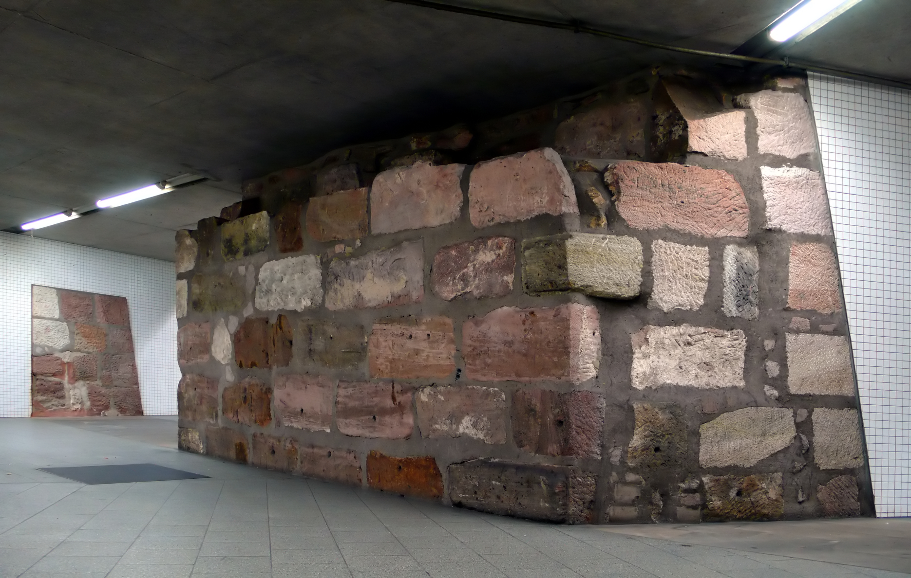 U-Bahnhof Rathenauplatz der U-Bahn Nürnberg, Zwischengeschoss, Reste der Stadtmauer